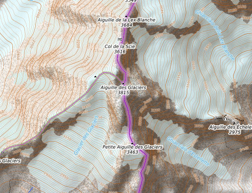 carte réalisée sur umap This map may be incomplete, and may contain errors. Don't rely solely on it for navigation.